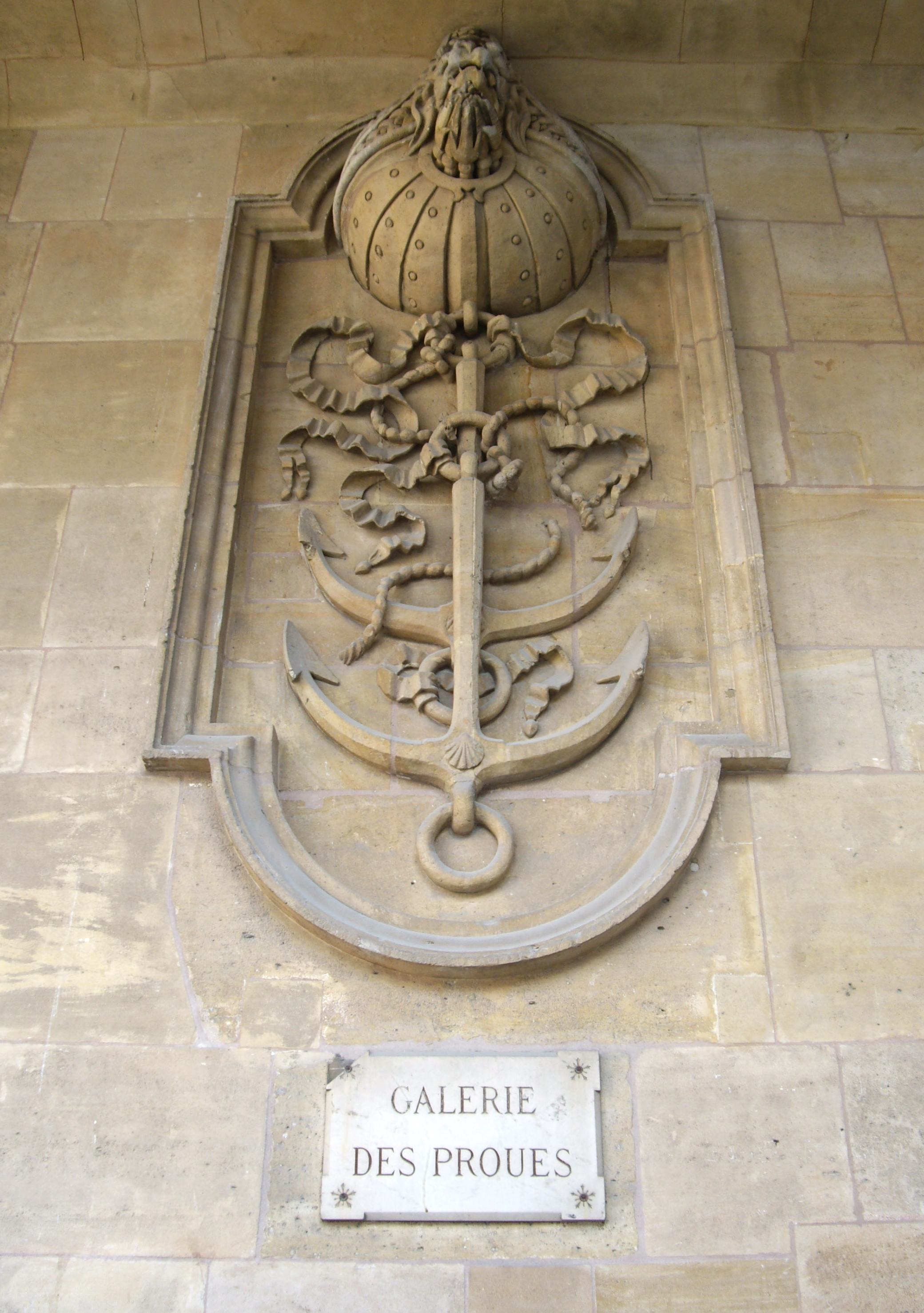 Galerie des Proues, Palais-Royal, Paris 1er.